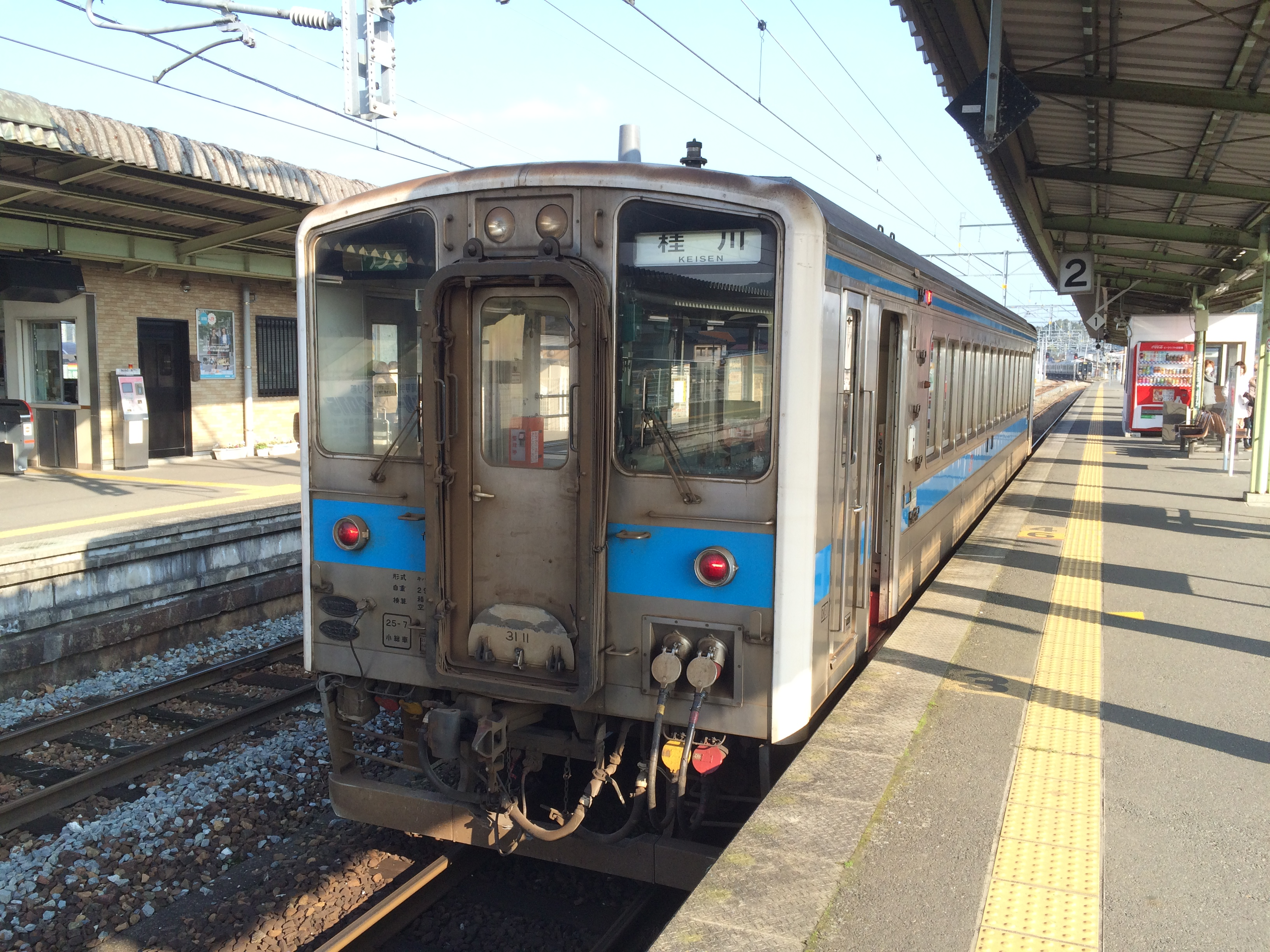 JR九州キハ31形気動車（桂川駅で撮影）